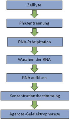 Arbeitsschritte der RNA-Isolation